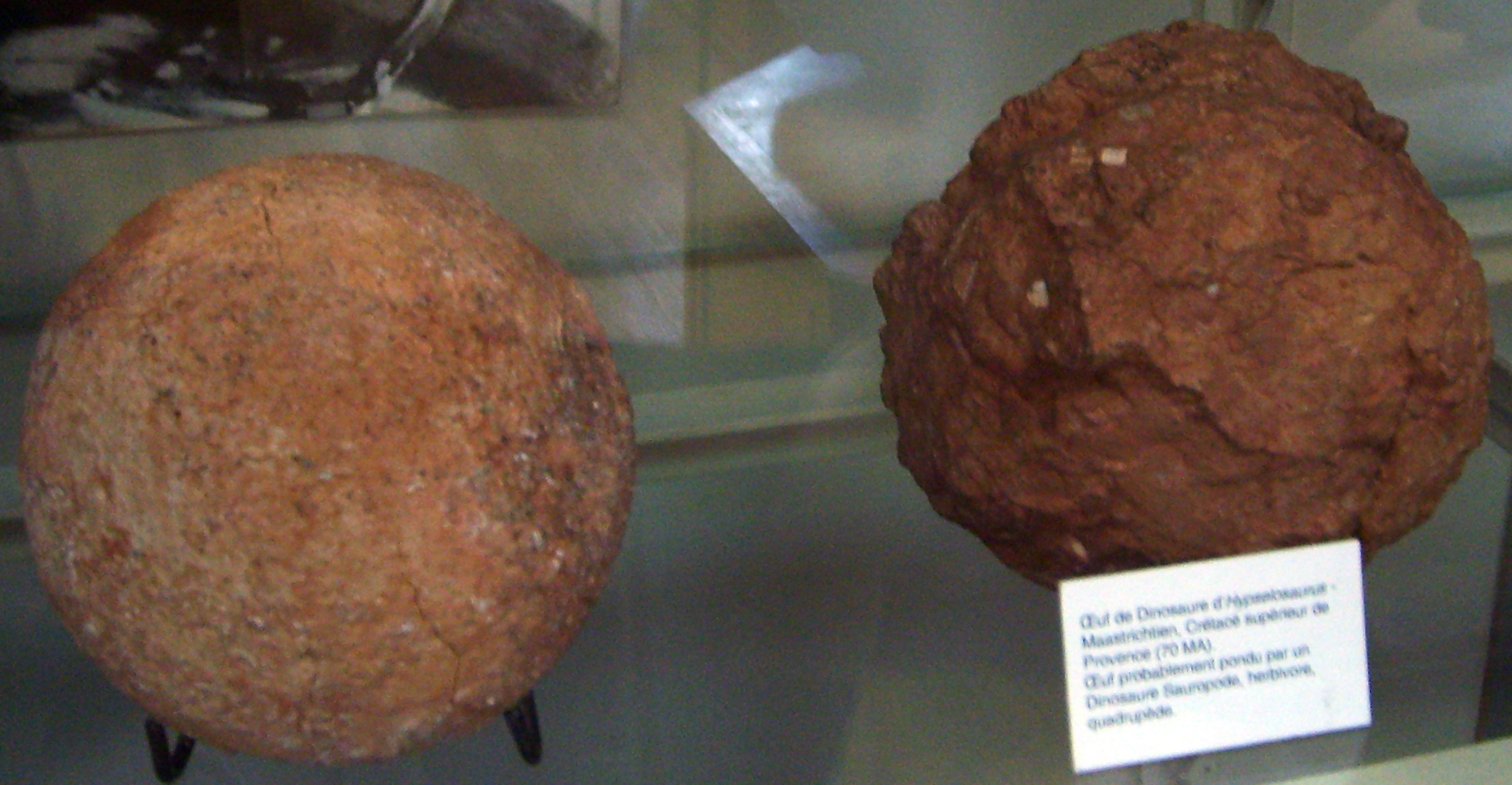 Hypselosaurus eggs from Provence, Muséum national d'histoire naturelle, Paris.